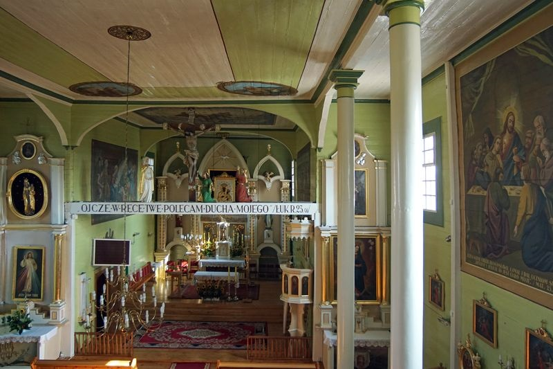 Budry, zespół kościoła ewangelickiego, ob. par. rzym.-kat. pw. Św. Trójcy